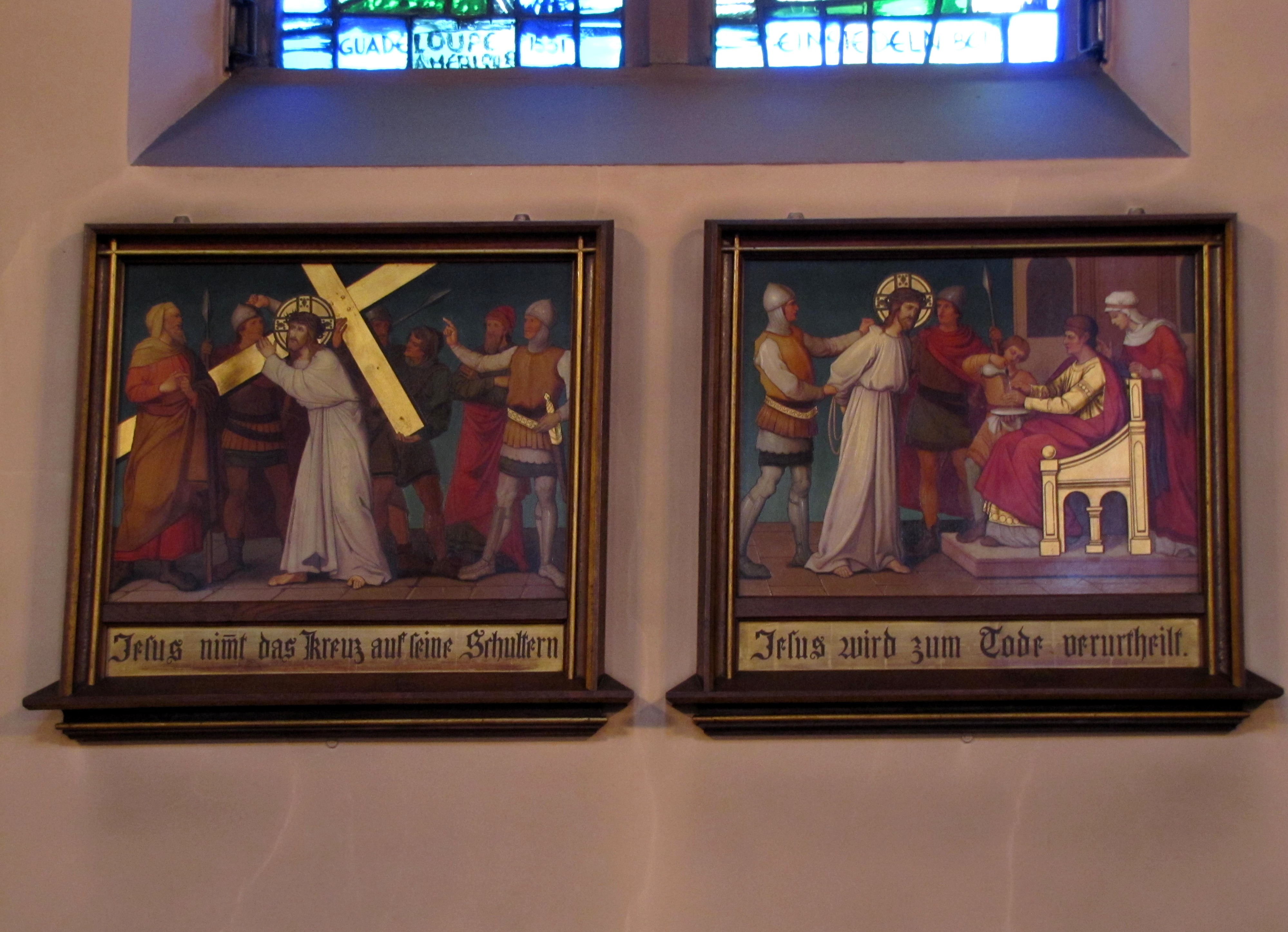 Alsace, Bas-Rhin, Haguenau, Basilique Notre-Dame-des-Douleurs de Marienthal (ancien Prieuré des Guillemites) (IA00062022). Chemin de croix (GOSS, huile sur bois, 40x65, 1888)